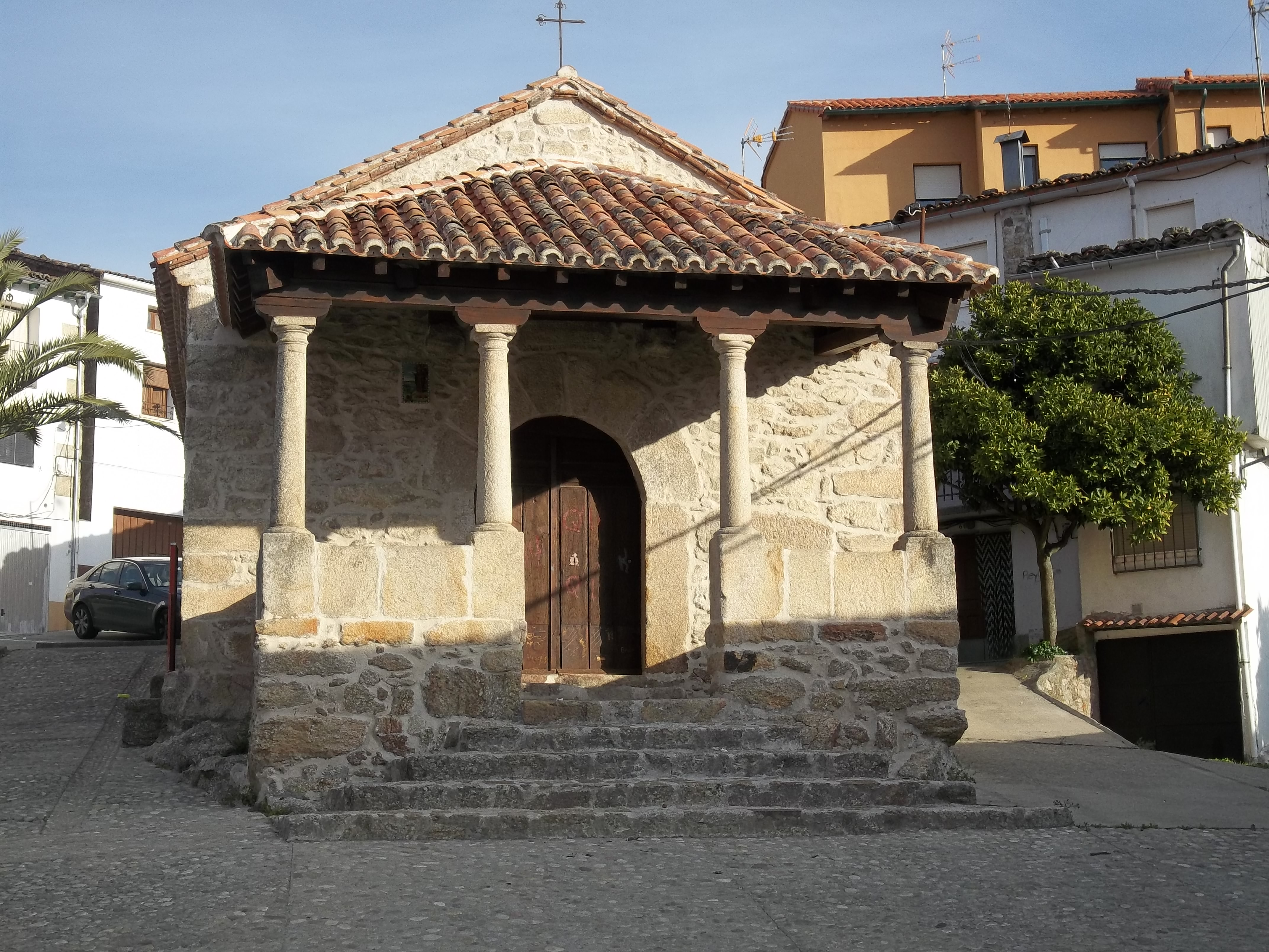 Ermita de San Antón, en Villanueva de la Vera (Cáceres - España)